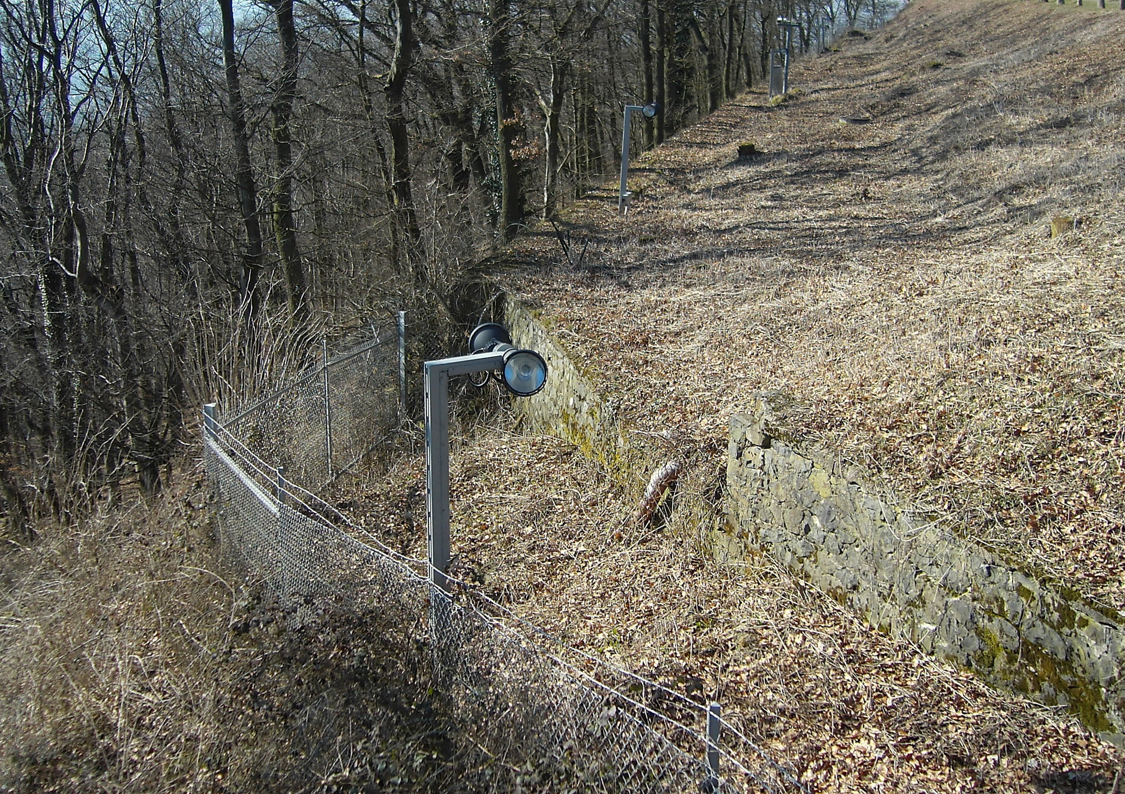 Sicherheitszaun des Grandhotels auf dem Petersberg bei Bonn, Königswinter.